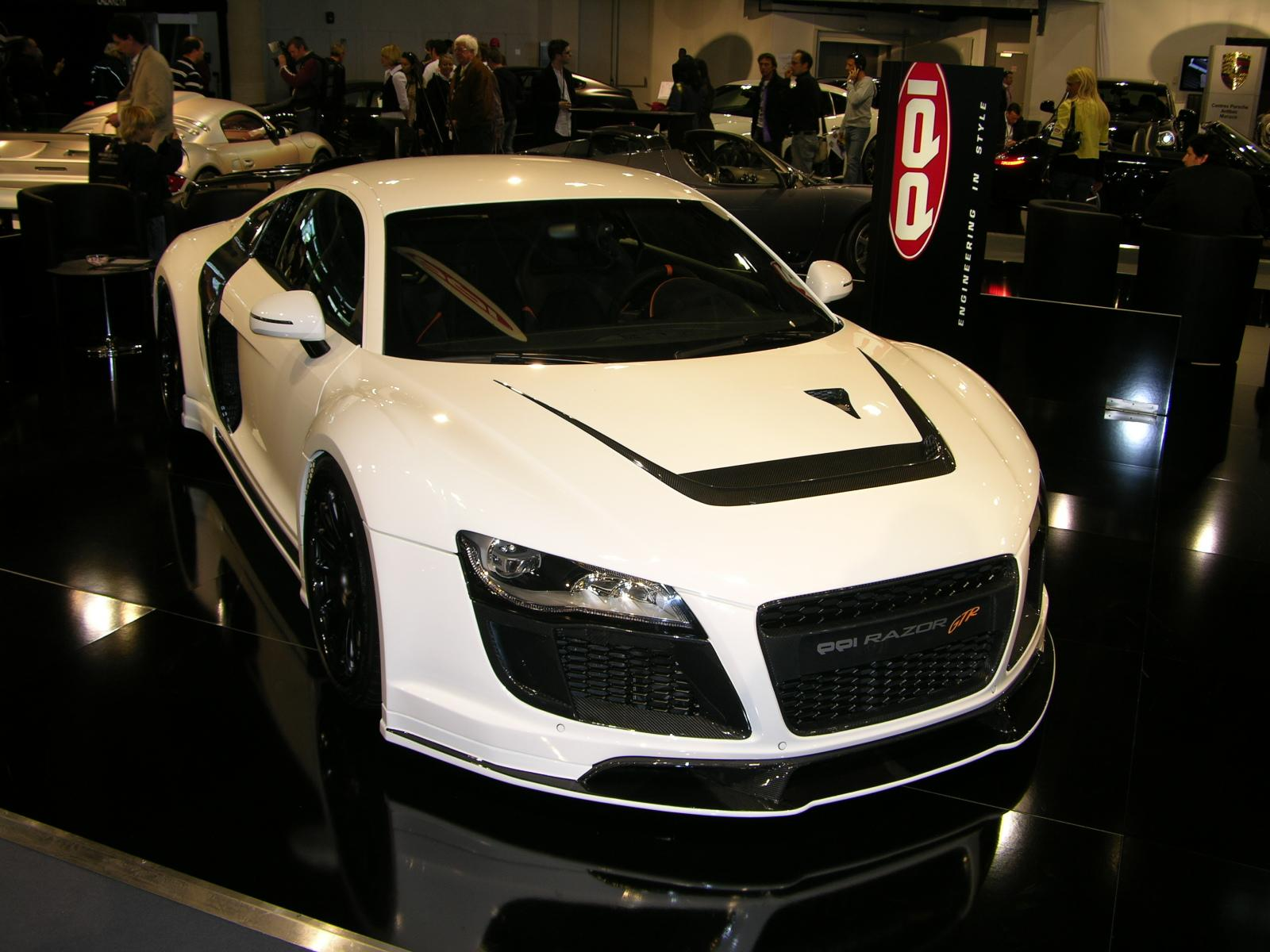 PPI R8 Razor